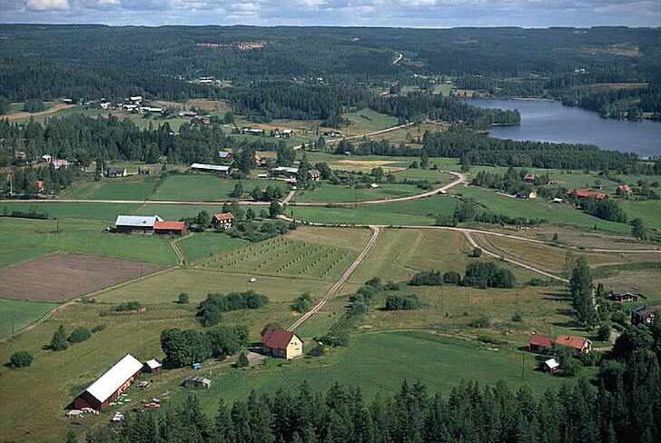 Motiv: Takene Nyckelord: Flygbilder, Riksintressen Kategori: JordbruksbyTakene